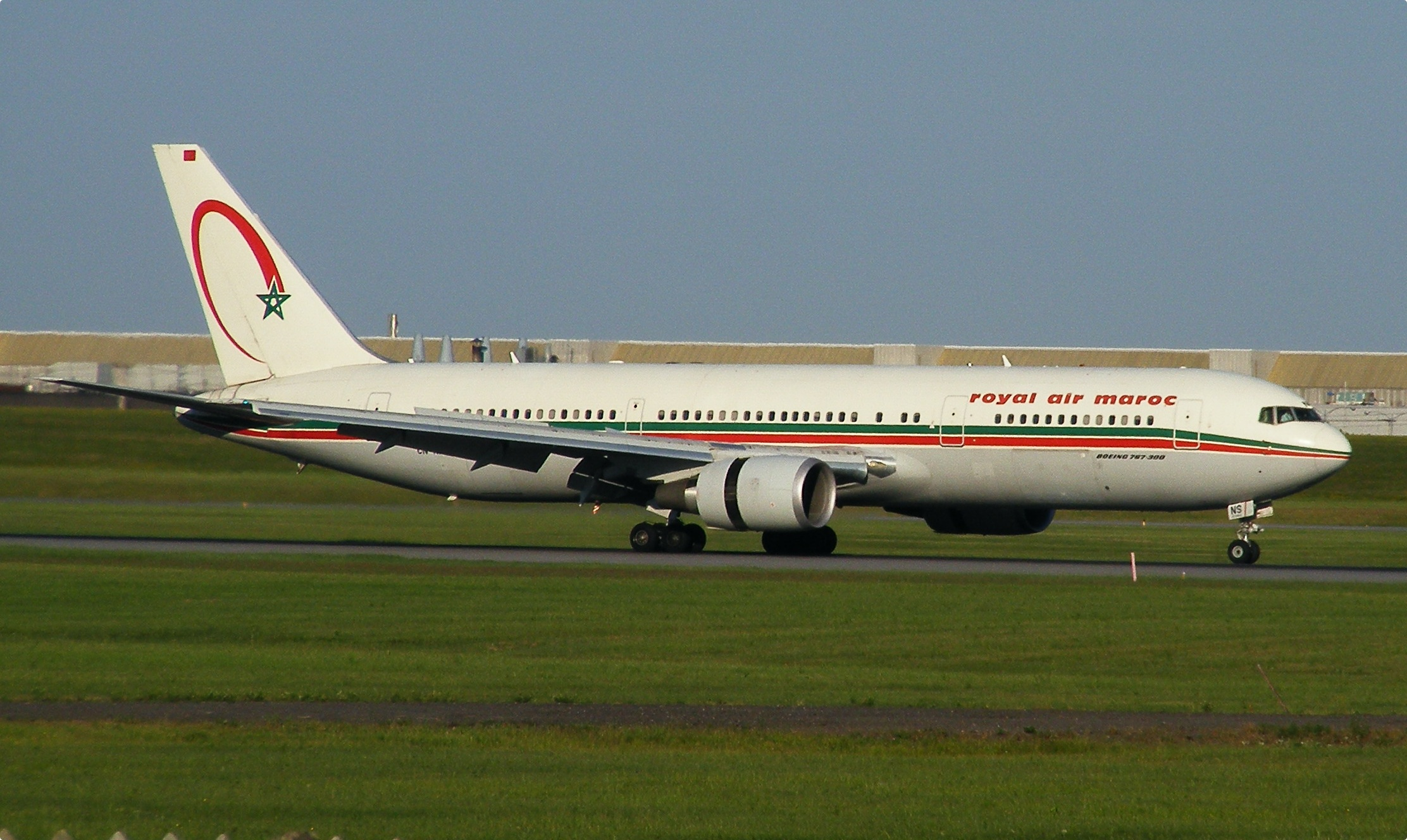 aéroport Montréal-Trudeau (YUL)